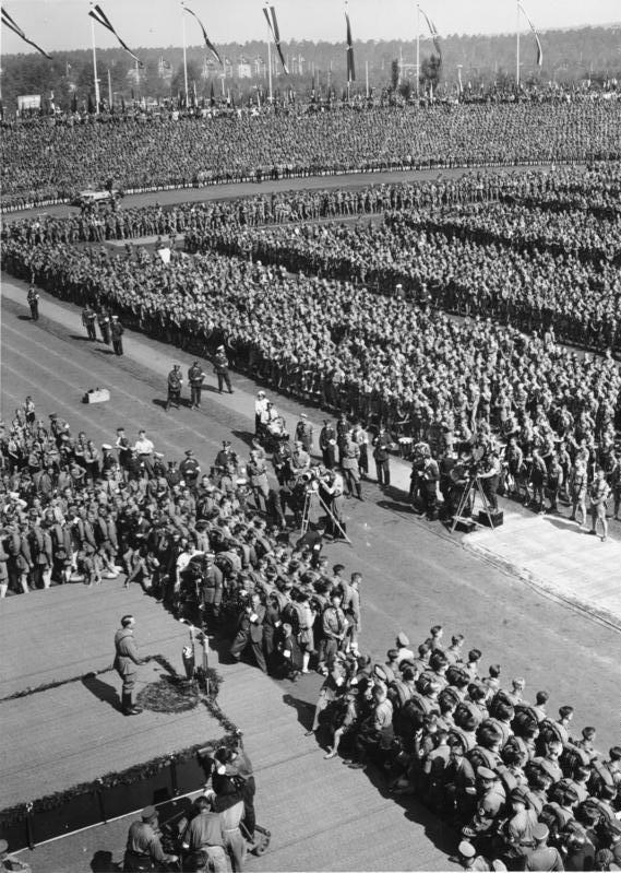 Nürnberg, Reichsparteitag, Rede Adolf Hitler Reichsparteitag 1934. Der Führer spricht im Nürnberger Stadion zur Jugend. [Nürnberg.- Reichsparteitag der NSDAP, "Reichsparteitag der Einheit und Stärke", Adolf Hitler am Rednerpult, 5.-10. September 1934] Abgebildete Personen: Hitler, Adolf: Reichskanzler, Deutschland